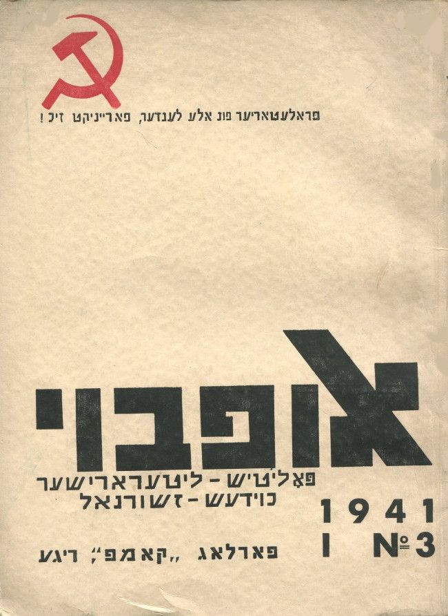 Обложка хорошо иллюстрирует советскую еврейскую периодику начала 1940-х годов